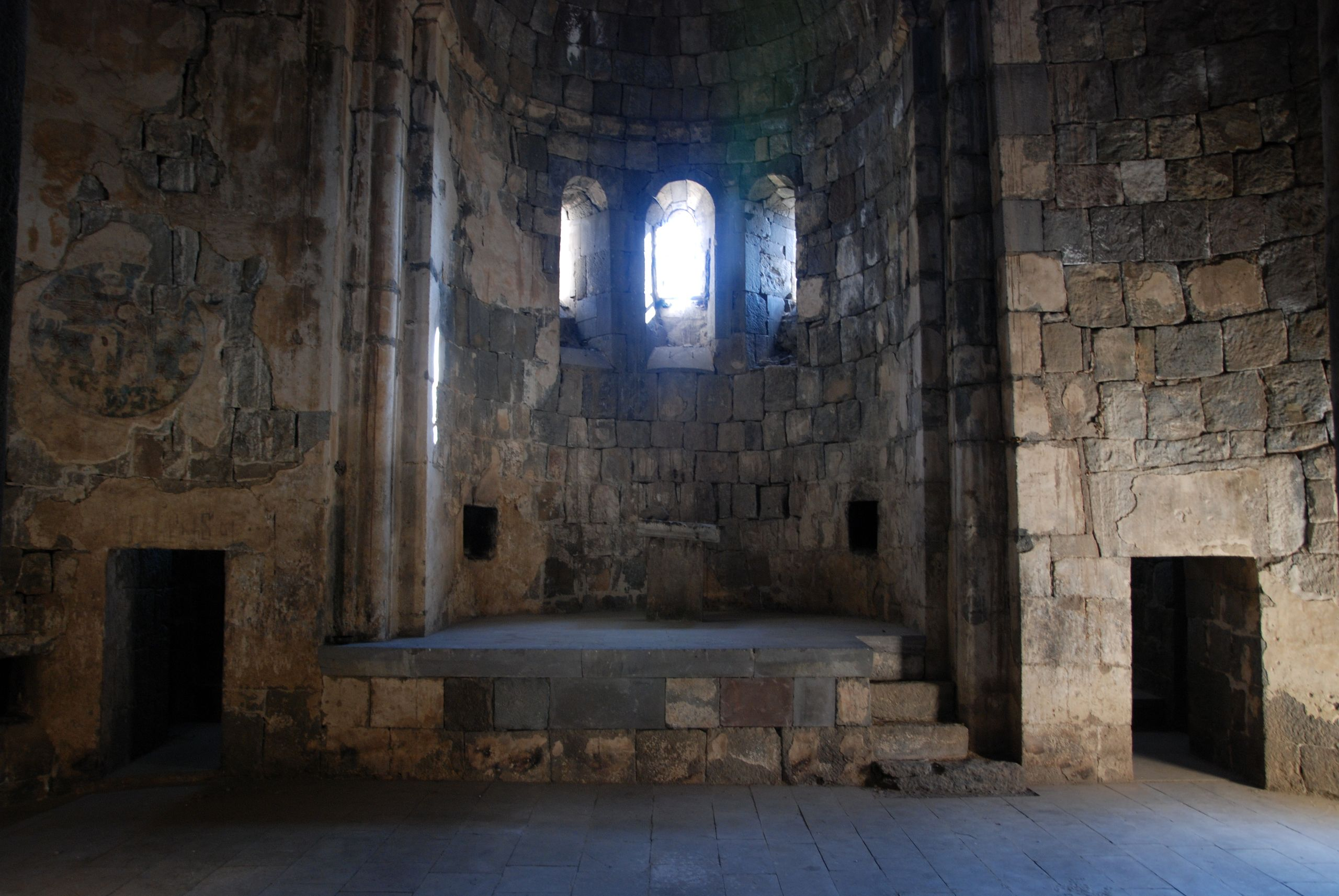 Vorotnavank, Surp Karapet